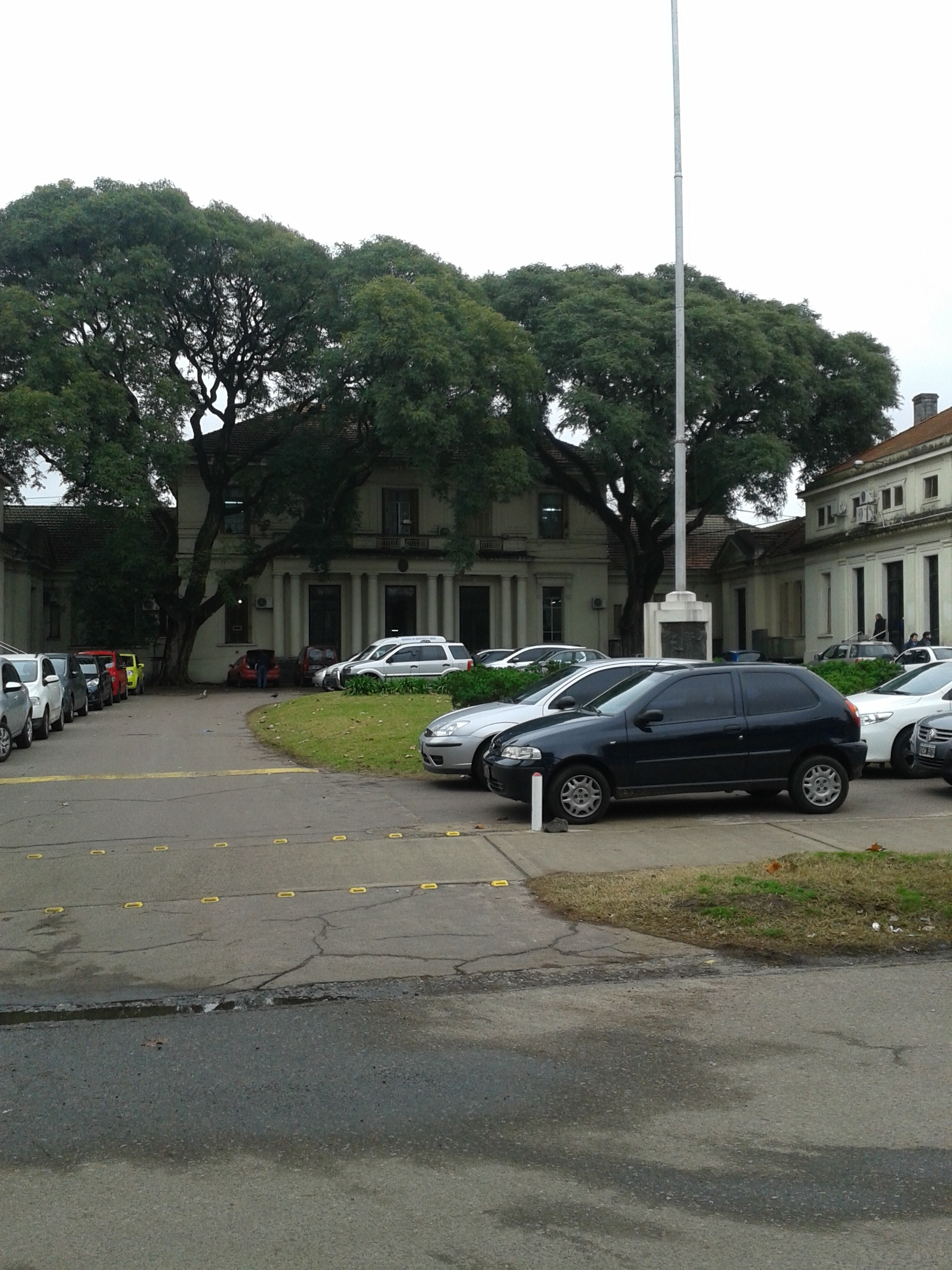 Facultad de Agronomía - Universidad de Buenos Aires - Pabellón Central